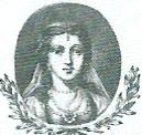 Judyta Czeska